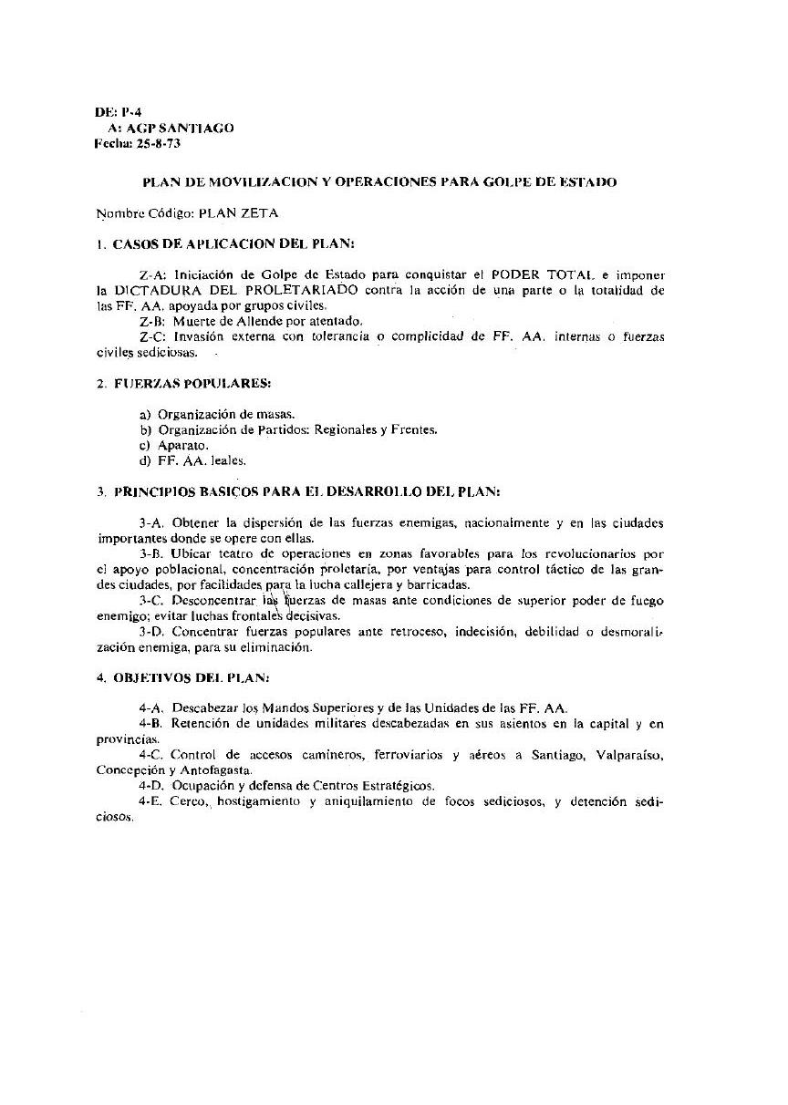 Transcripción del "Plan de movilización y operaciones para el golpe de estado. Nombre código: Plan Zeta". El Plan Zeta es el nombre atribuido en Chile a un supuesto plan del gobierno de Salvador Allende, para llevar a cabo una insurrección armada, un autogolpe, con el fin de imponer a la fuerza un gobierno marxista. La supuesta existencia de este plan fue divulgada por los militares que perpetraron el golpe de Estado de 1973. Los archivos desclasificados de la CIA a partir de 1999 demostraron que el Plan Zeta jamás existió, y que su divulgación fue una operación de guerra psicológica de los militares chilenos, específicamente de la Armada de Chile, en que impusieron la lógica del «ellos o nosotros» para justificar la represión y violaciones a los derechos humanos llevados a cabo durante la dictadura militar. Federico Willoughby-MacDonald, colaborador del Régimen Militar, descartaría plenamente con posterioridad dicho plan denunciándolo como una «falsedad».